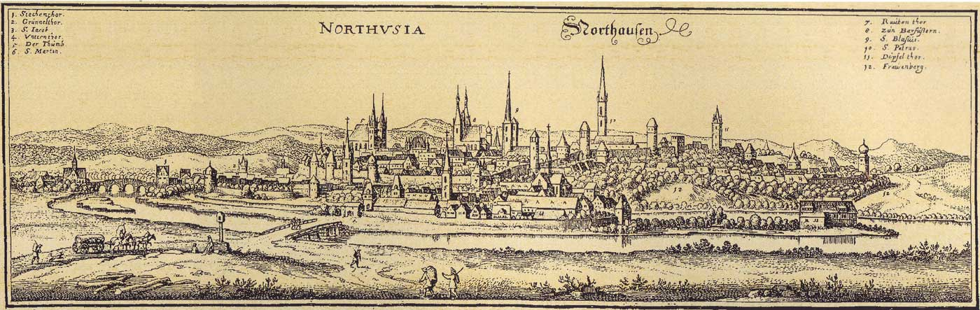 Holzschnitt von Johann Gottfried Zeidler 1691 Nachdruck und Ergänzung eines anonymen Holzschnittes von 1611, nach einer Radierung von Hieronymus Nützel, in der Lutherhalle Wittenberg